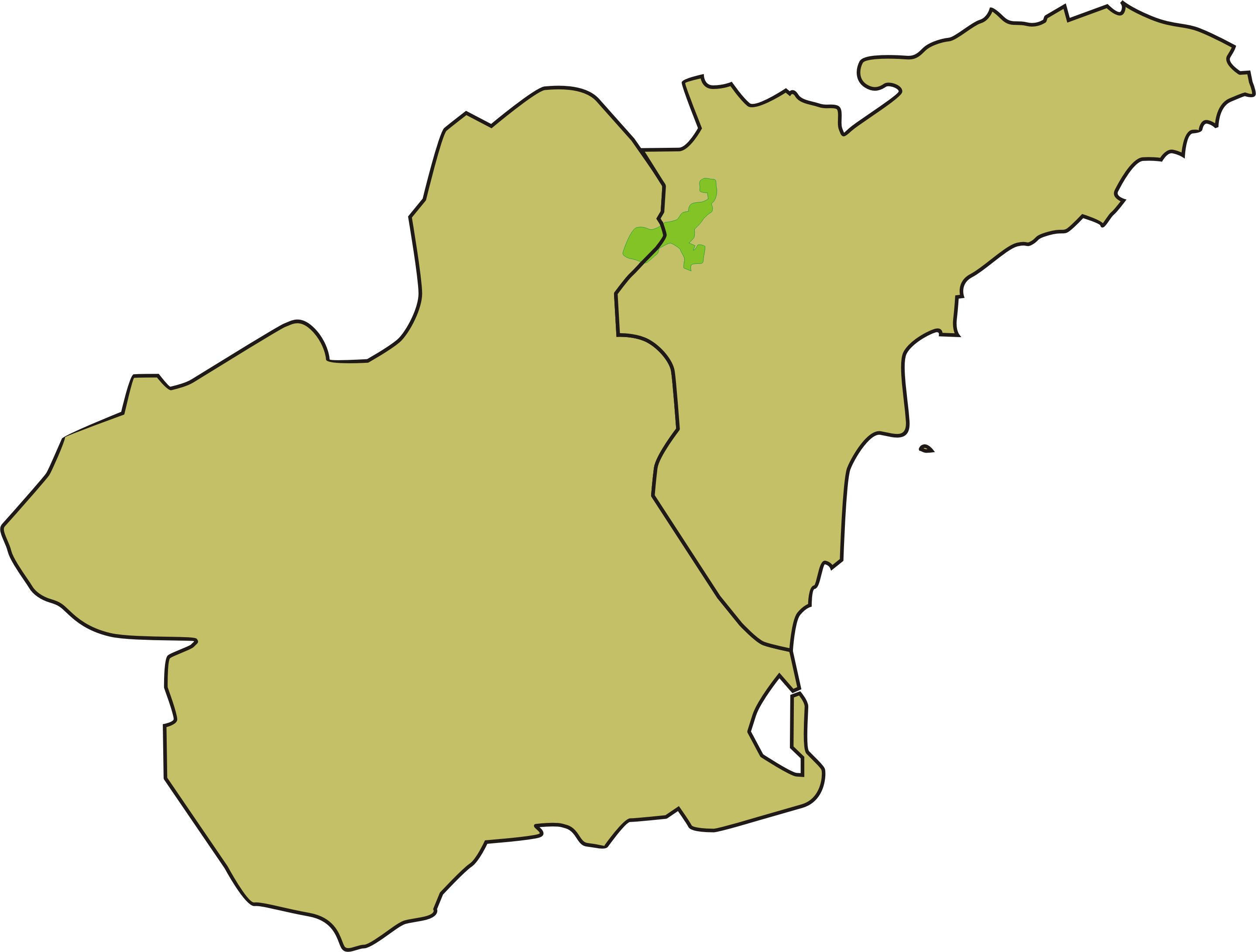 Situació de la Serra de Salines entre la província d'Alacant (País Valencià) i la Regió de Múrcia.